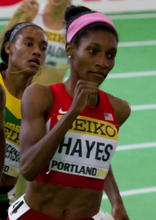 470 finale 400m dames